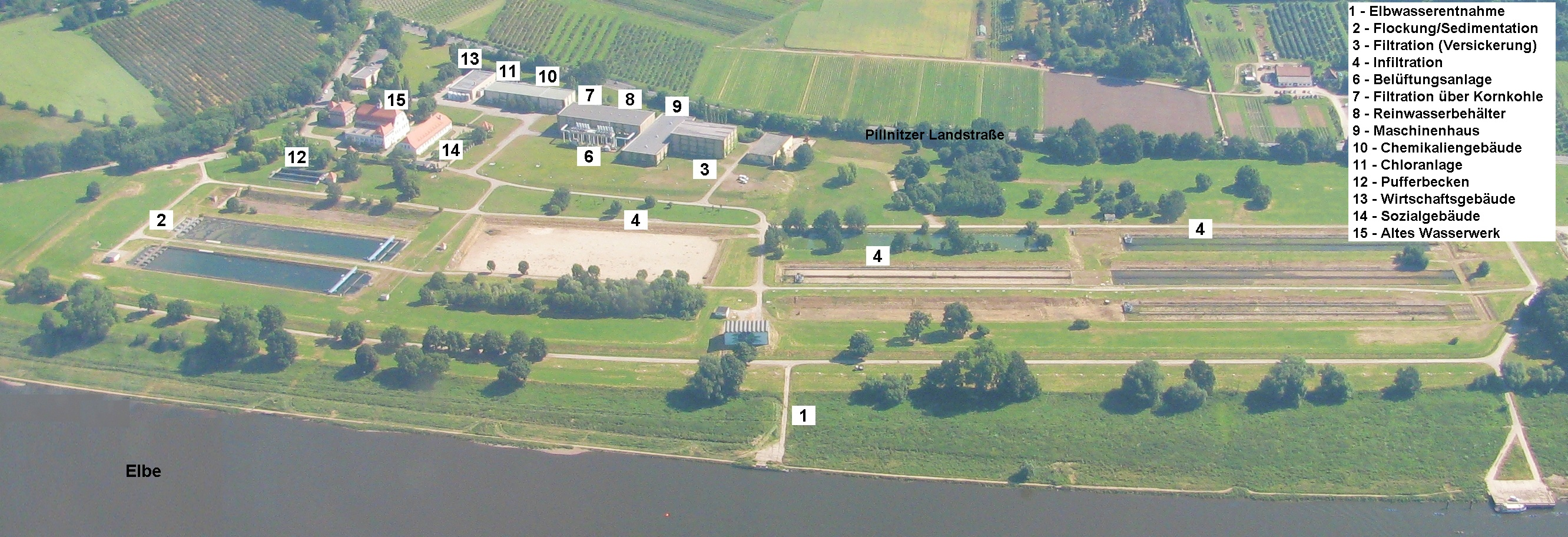 Luftbild Wasserwerk Hosterwitz 2010, mit Legende